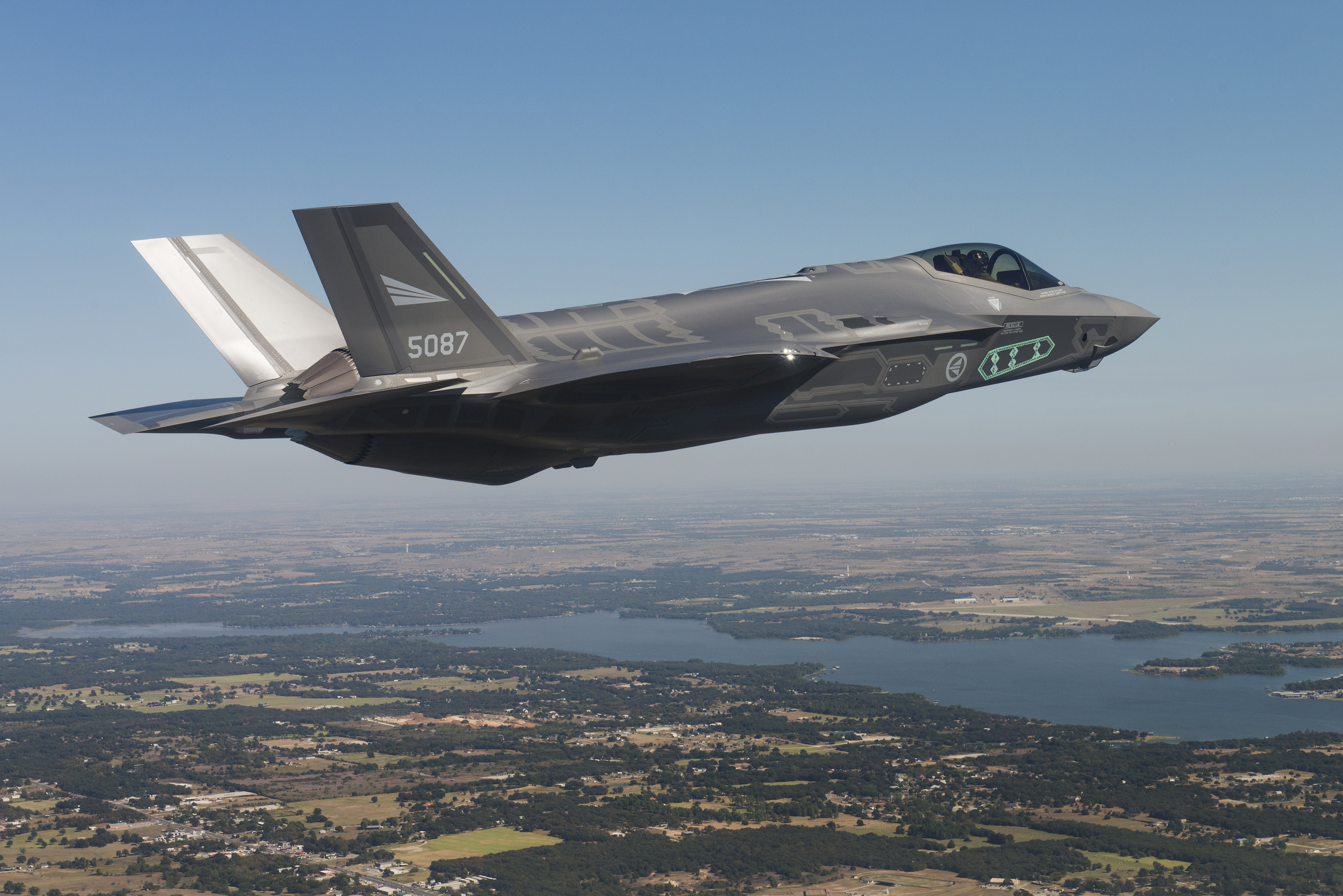 Her tester en flyger fra det amerikanske luftforsvaret Norges første F-35 (AM-1 - 5087) fra Lockheed Martins fabrikk i Fort Worth, Texas, 15. oktober. Bildene tilhører Lockheed Martin, men kan fritt brukes mot kreditering. Fotograf: Kaszynski - Images from a test flight of Norway's first F-35 taken on 15 October 2015. Photo: Kaszynzki, Lockheed Martin.